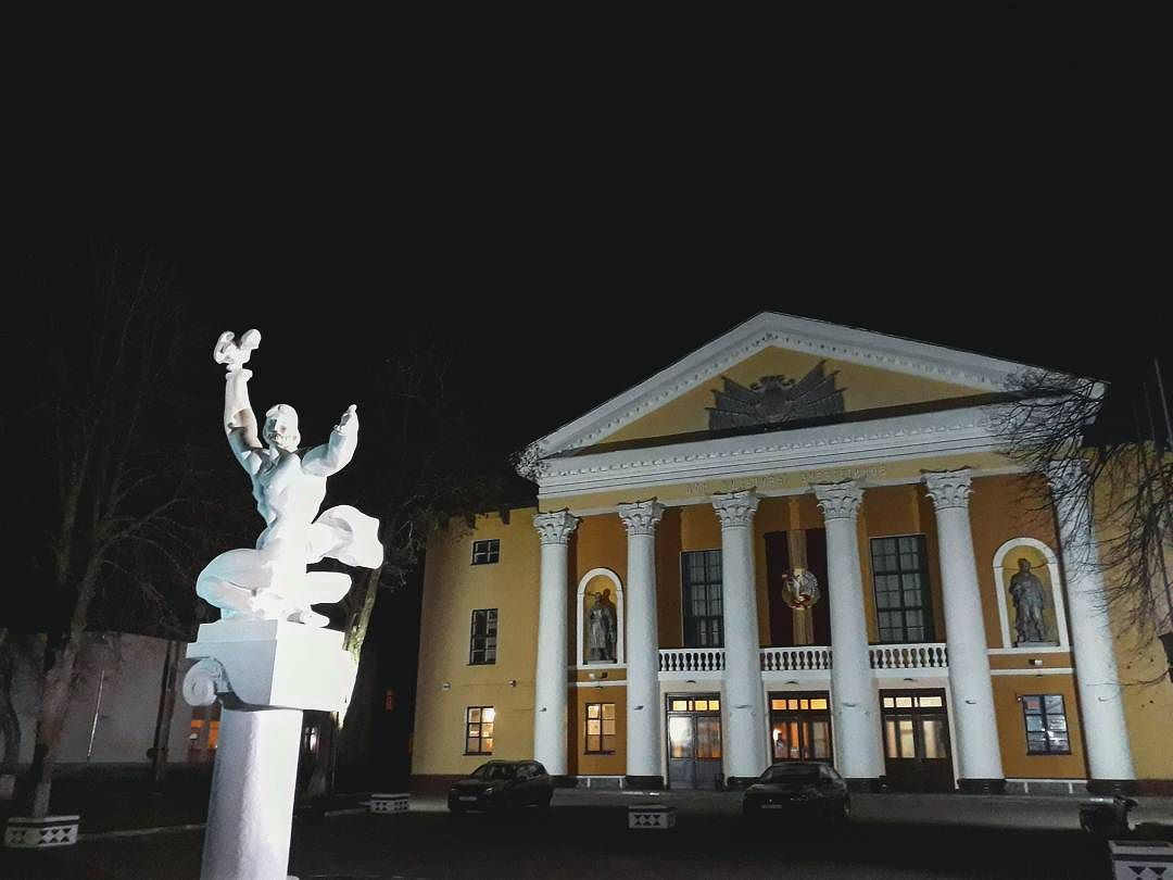 Дом культуры энэргетыкаў